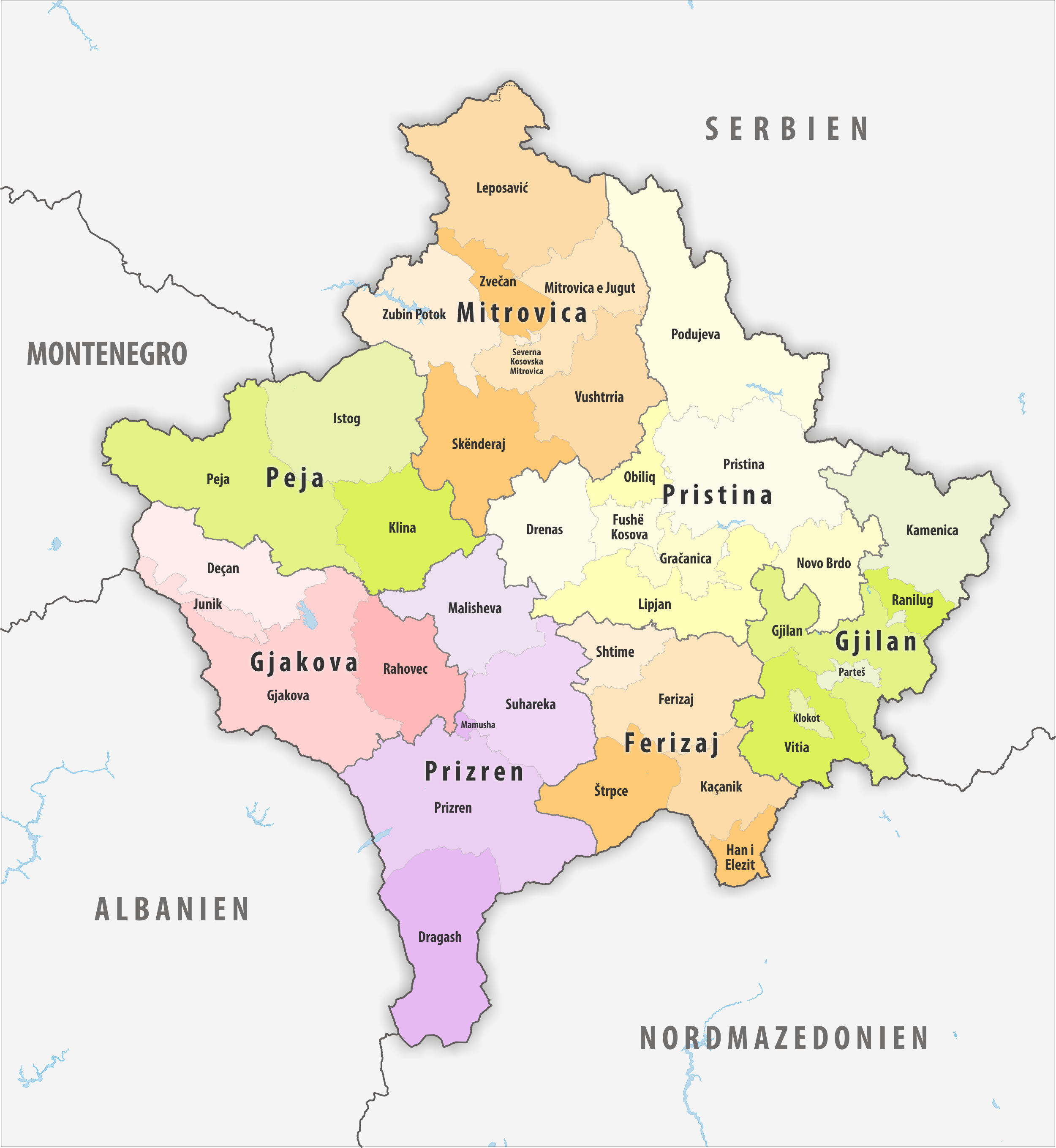 Politische Gliederung Kosovos